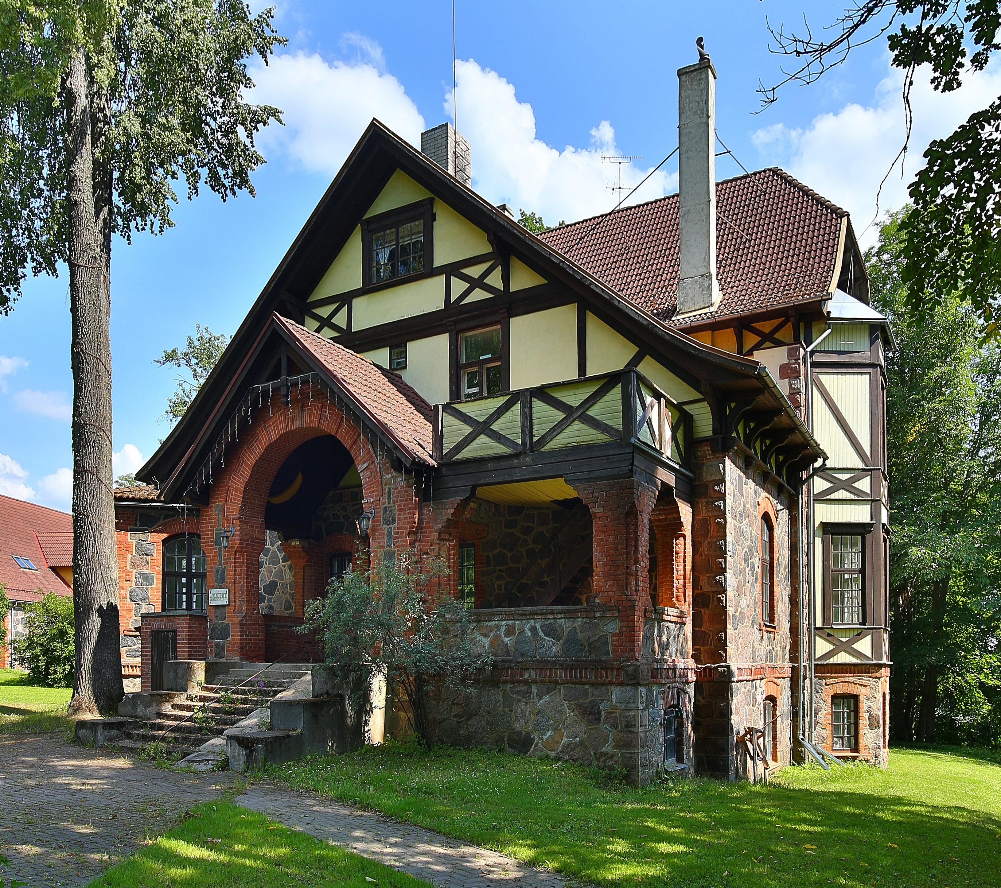 Väikemõisa mõisa peahoone